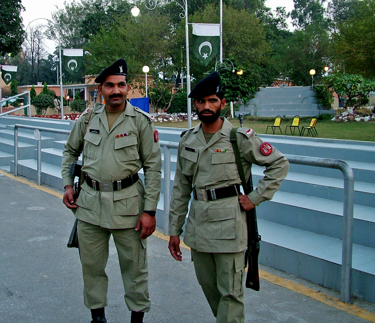 Pakistani soldiers at Wagah border